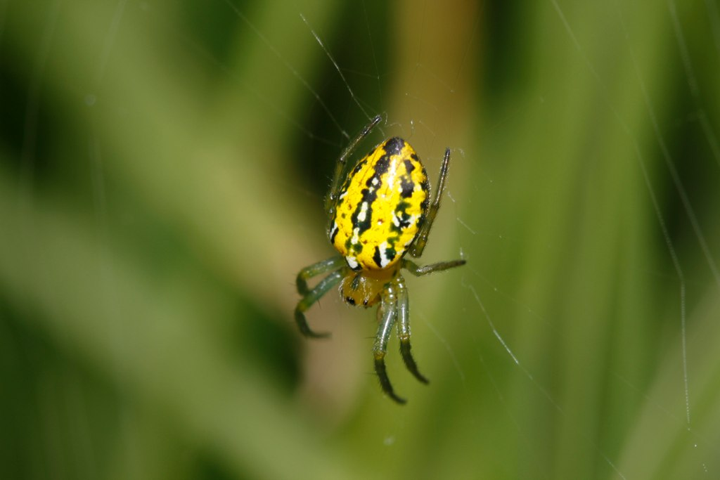 Esemplare di Alpaida variabilis